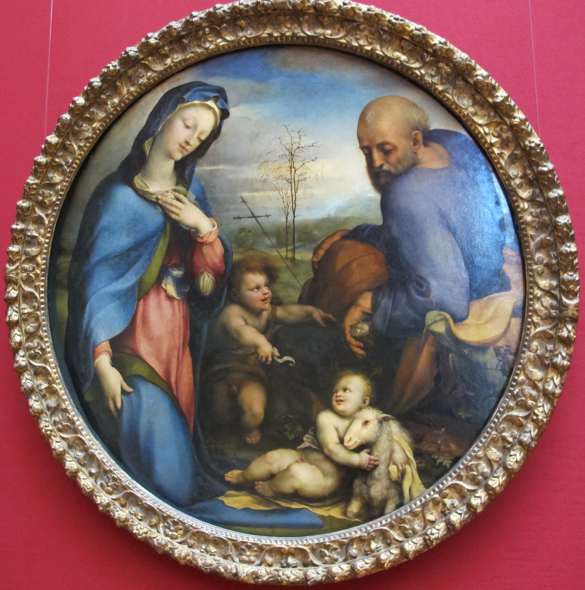 Beccafumi, sacra famiglia con san giovannino e l'agnellino